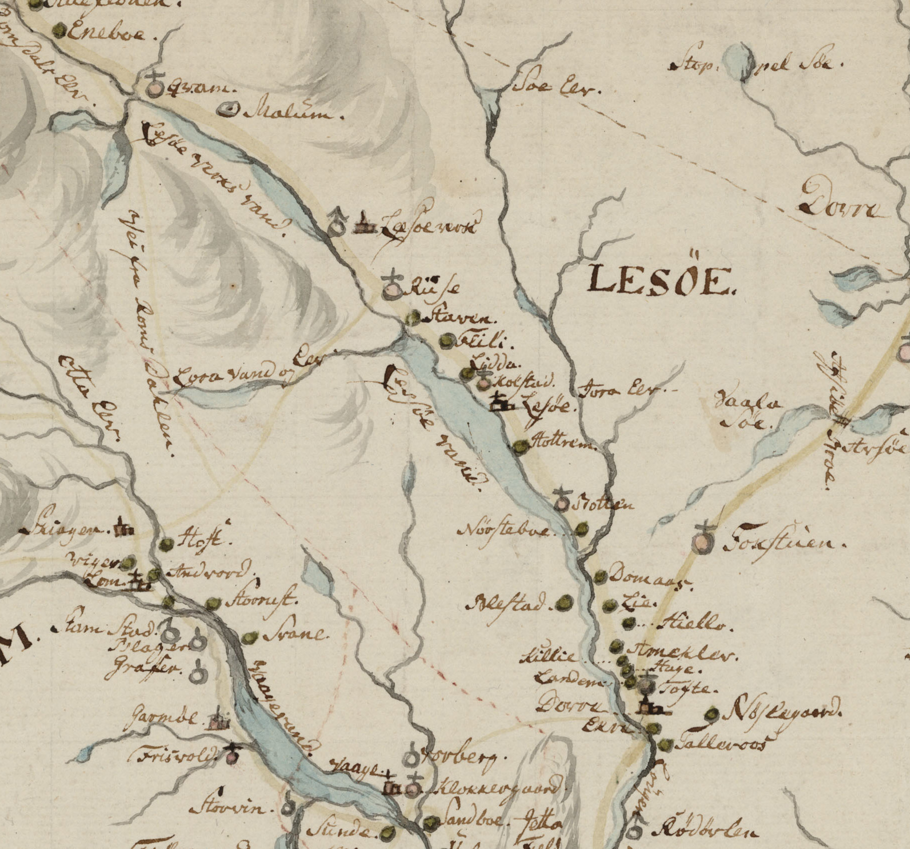 Kart over Gulbrands Dahlens Provstie og Fogderie afdeelet i Kiercke Sogner.